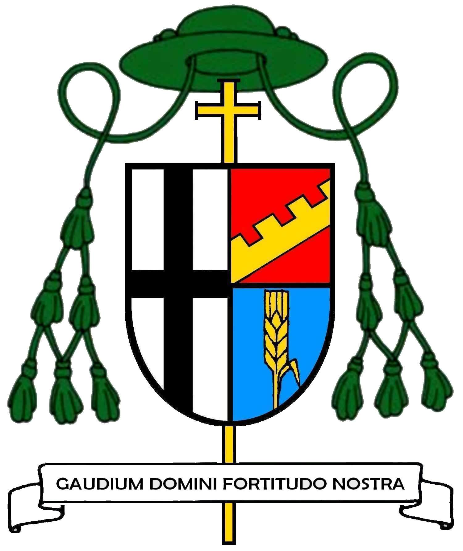 Wappen Johannes Kapp, (* 14. Mai 1929 in Burguffeln), Titularbischof von Melzi und em. Weibischof in Fulda (1976-2004)